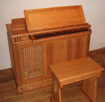 kestorgeno.